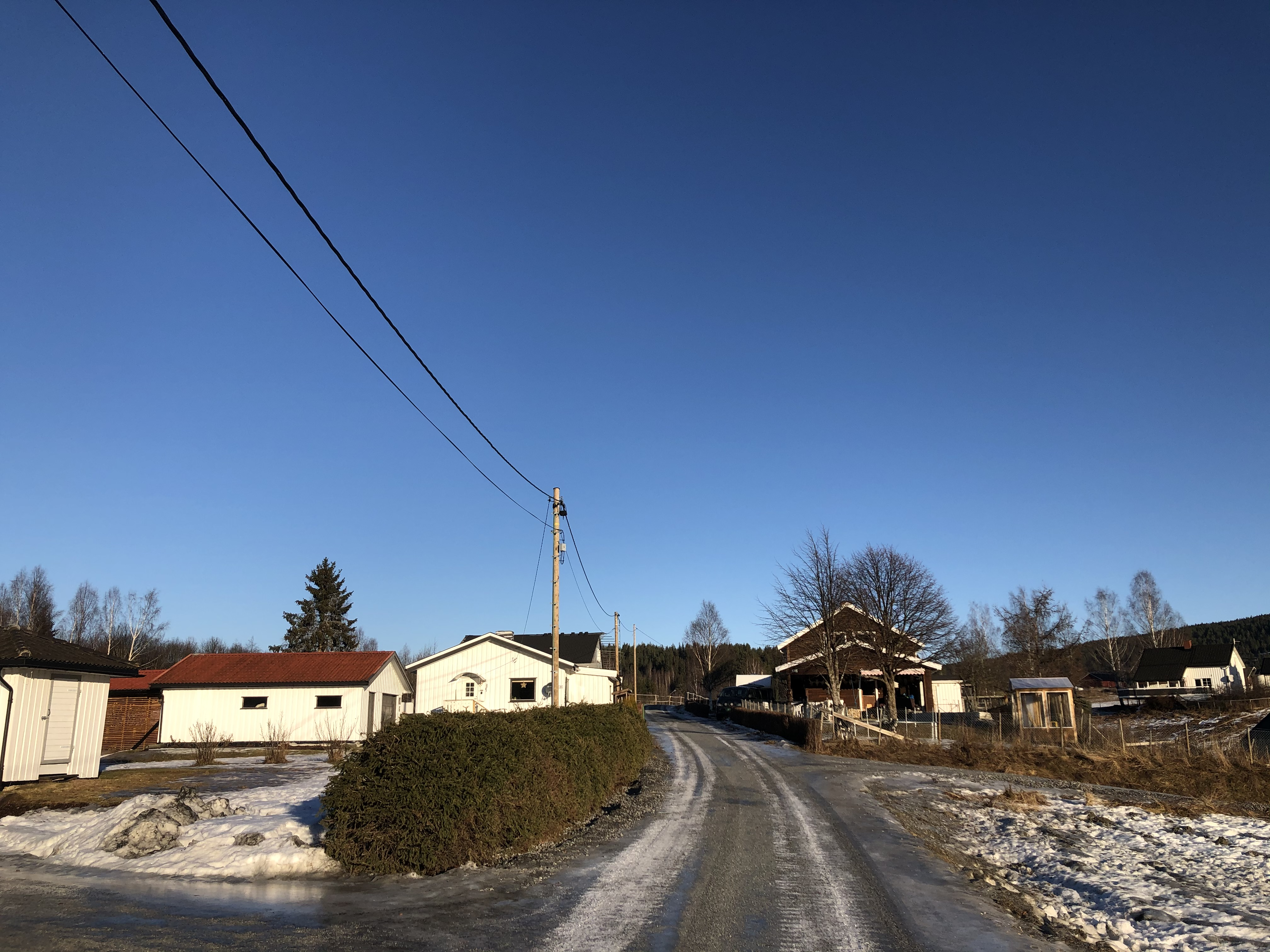 Stadionveien, Veme, Ringerike